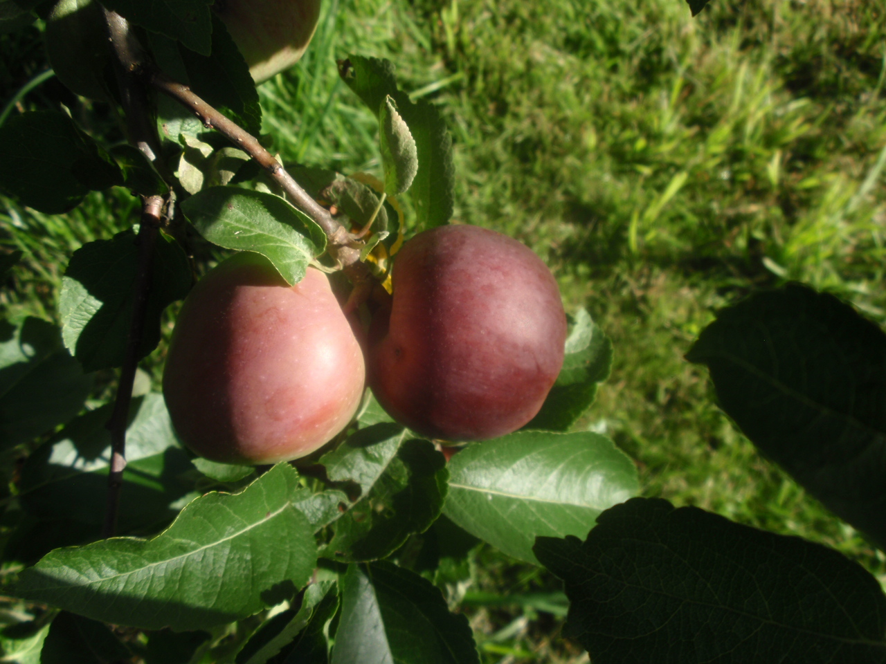 Spartan apple variety